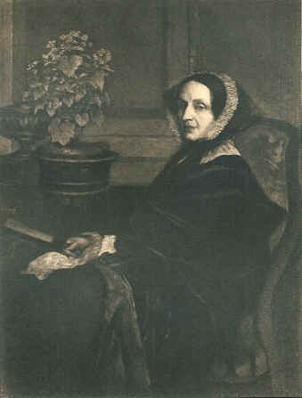 Dorothée de Benkendorf, princesse de Lieven, vers 1855, d'après un portrait par G.F. Watts. Domaine public